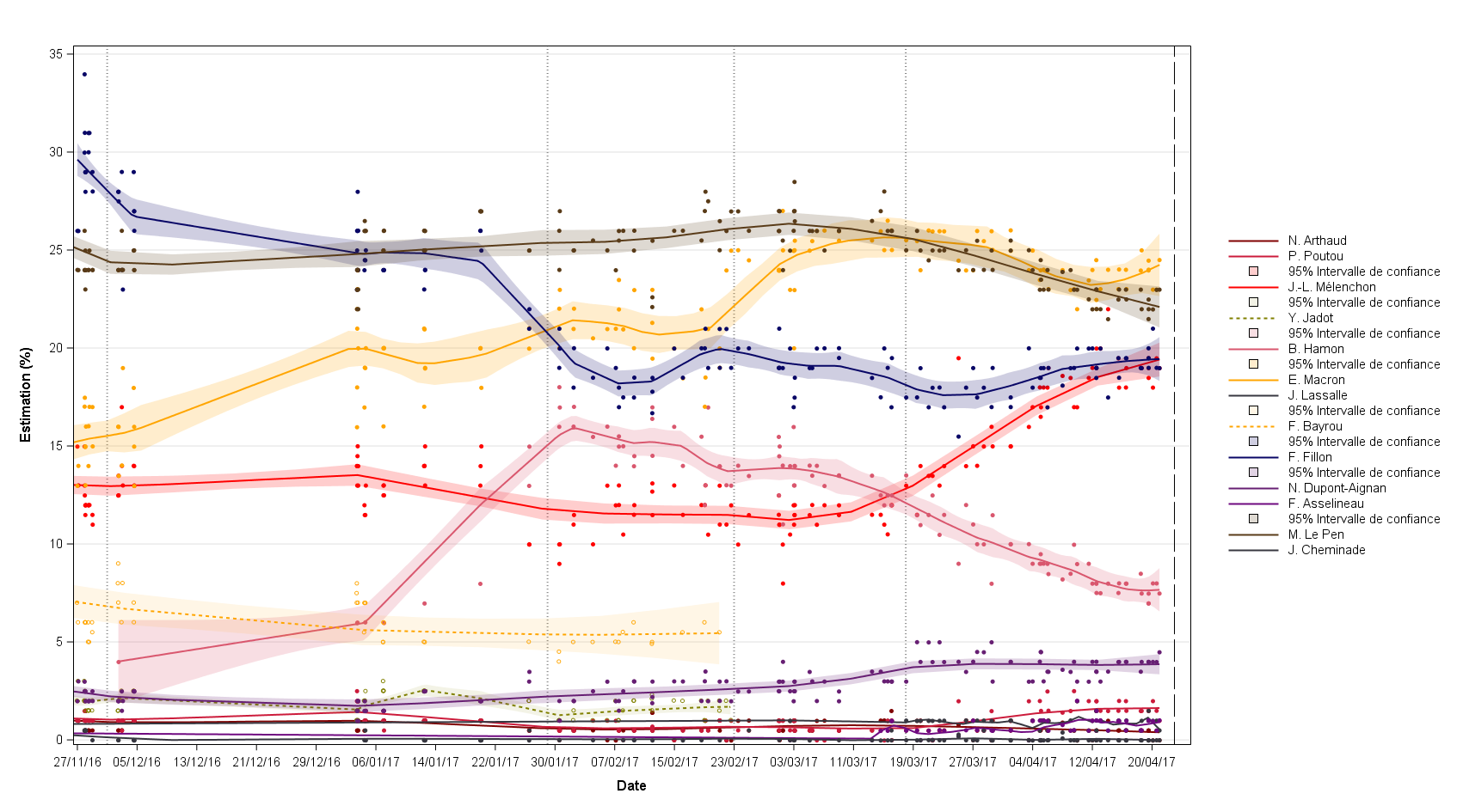 Représentation graphique des intentions de vote pour les candidats à la présidence de la République Française (2017-2022). L'axe vertical représente le pourcentage d'intention de vote pour les candidats. L'axe horizontal représente le temps et commence à l'issue de la primaire de la droite et du centre (27/11/2016). Les lignes verticales pointillées marquent les dates clés que sont, dans l'ordre chronologique, l'annonce du renoncement du président sortant François Hollande à se représenter (01/12/2016), le dénouement de la primaire citoyenne et l'élection de Benoît Hamon (27/01/2017), les annonces concomitantes du ralliement de Yannick Jadot à la candidature de Benoît Hamon, et de François Bayrou à celle d'Emmanuel Macron (23/02/2017), le début officiel de la campagne et l'annonce des candidats ayant reçus les parrainages nécessaires (18/03/2017), et enfin, la date du premier tour de l'élection (23/04/2017). Chaque point représente, pour un candidat donné, l'intention de vote estimé par un sondage. Chaque courbe représente, pour chaque candidat, l'évolution des intentions de vote en sa faveur au cours du temps. Celles-ci sont modélisées par régression locale, une méthode de modélisation non-paramétrique et ne faisant donc pas d'hypothèse a priori sur la forme de l'évolution. Les candidats retirés sont représentes par des courbes interrompues. Chaque courbe est entourée d'un intervalle de confiance à 95 %, représenté par une surface colorée transparente, qui est issu de la méthode de modélisation ; celle-ci ne doit pas être confondue avec l'intervalle de confiance qui est donné par les instituts pour chaque sondage, et qui dépend de la taille de l'échantillon. Néanmoins, ces deux types d'intervalles de confiance ont tendance, de fait, à converger.